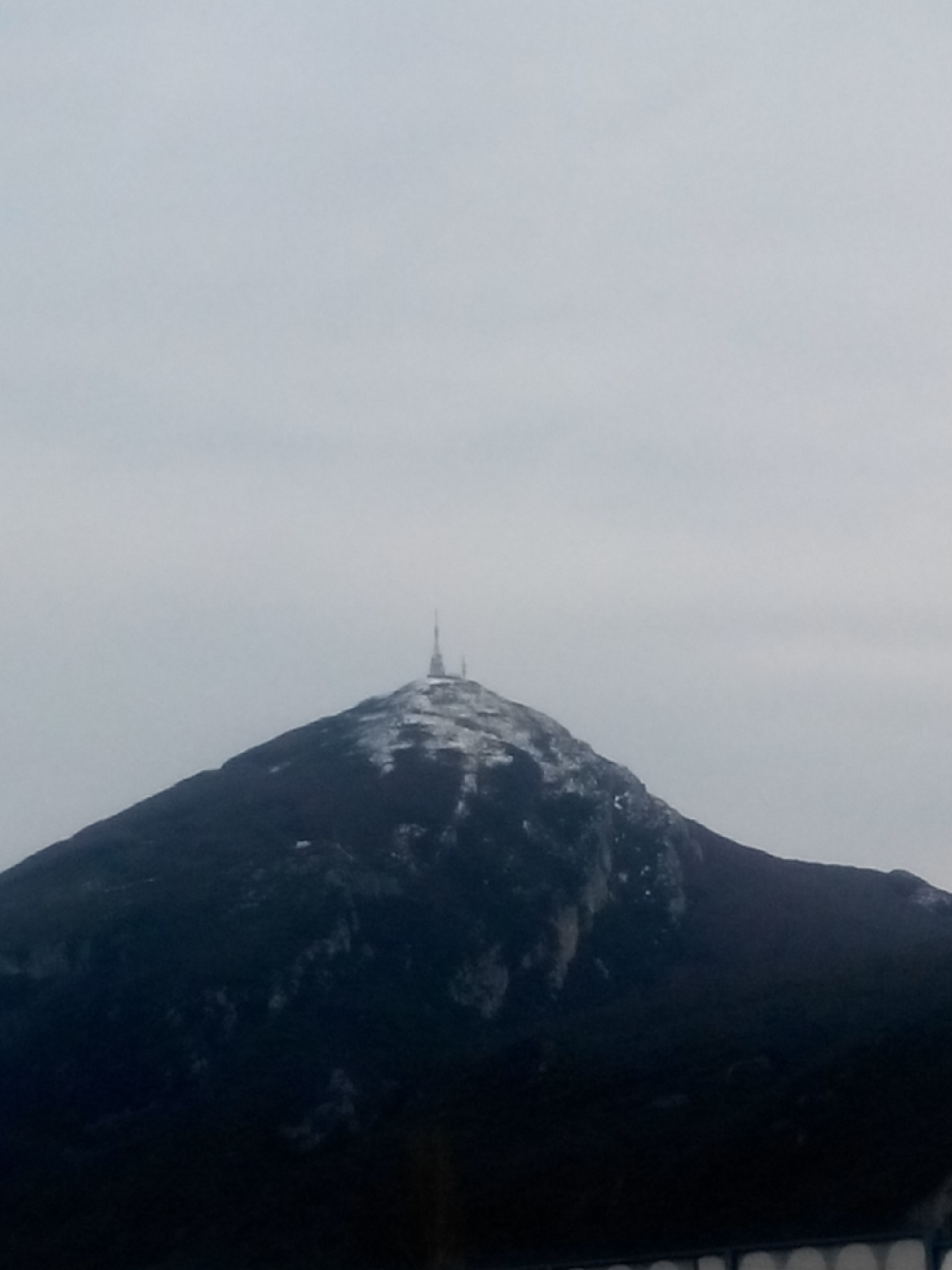 Higa de Monreal (Navarra)